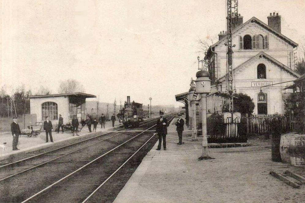 Une locomotive stationne sur la voie paire en direction d'Ormoy-Villers (au fond de la photo). Le personnel de la gare pose pour le photographe.